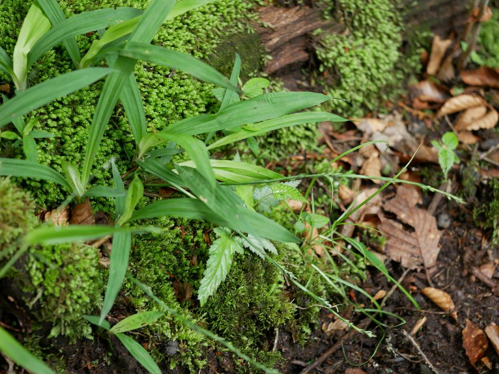 2019/06/09 愛媛県：Ehime Pref., Japan